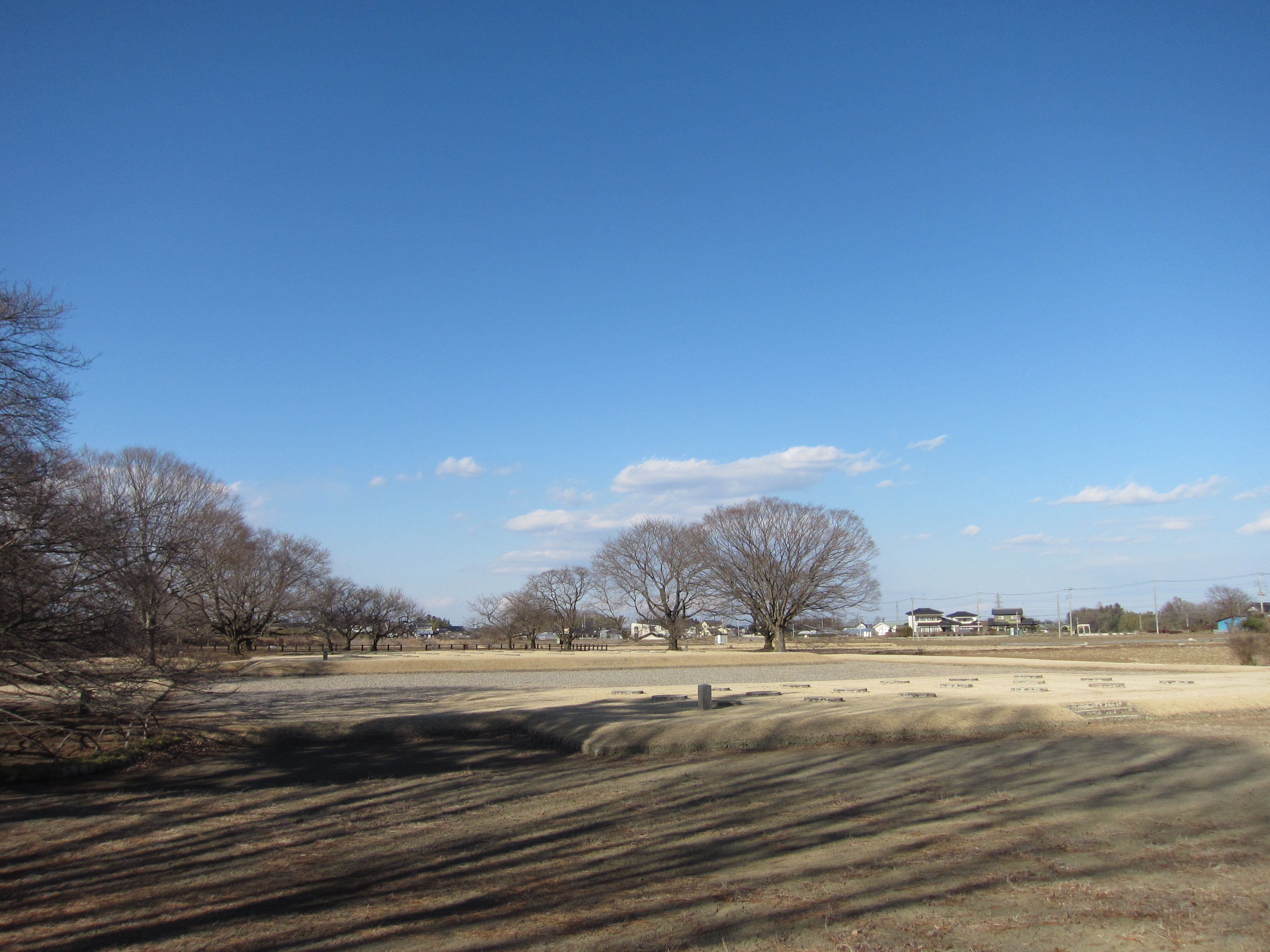 下野国分尼寺跡 伽藍